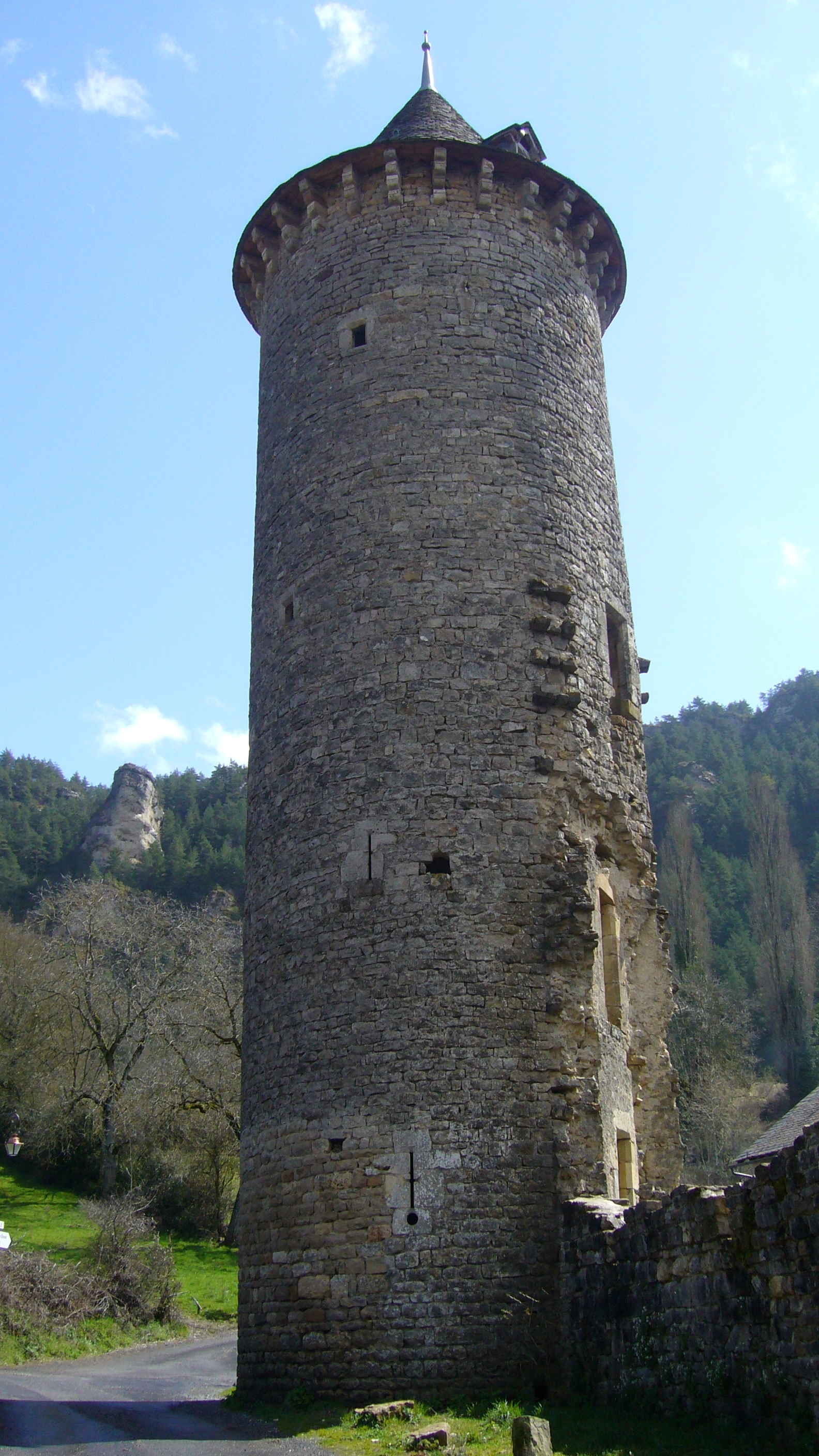 Le village de Saint-Saturnin, Lozère, France